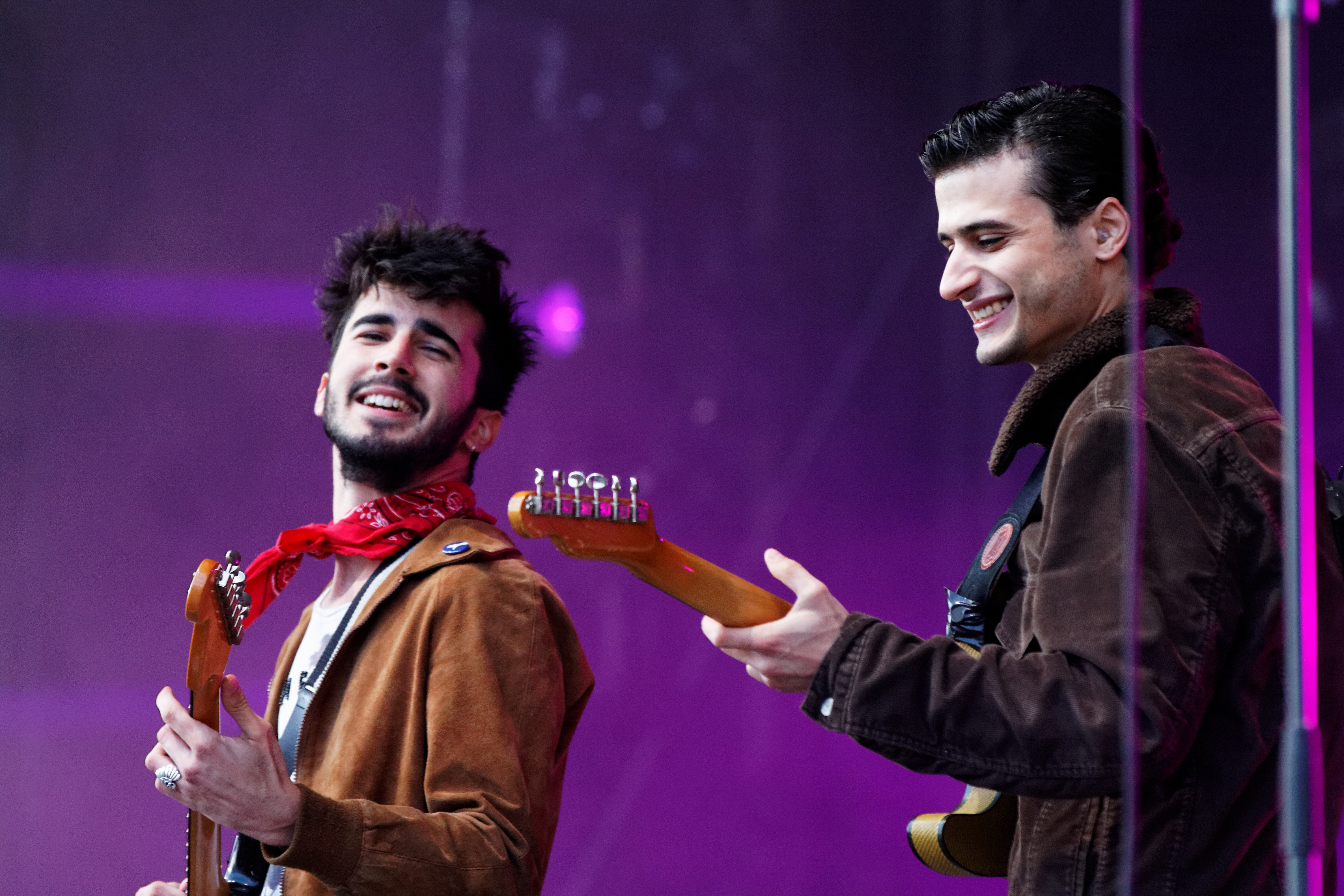 BB Brunes en concert sur la grande scène lors de la fête de l'Humanité 2012.